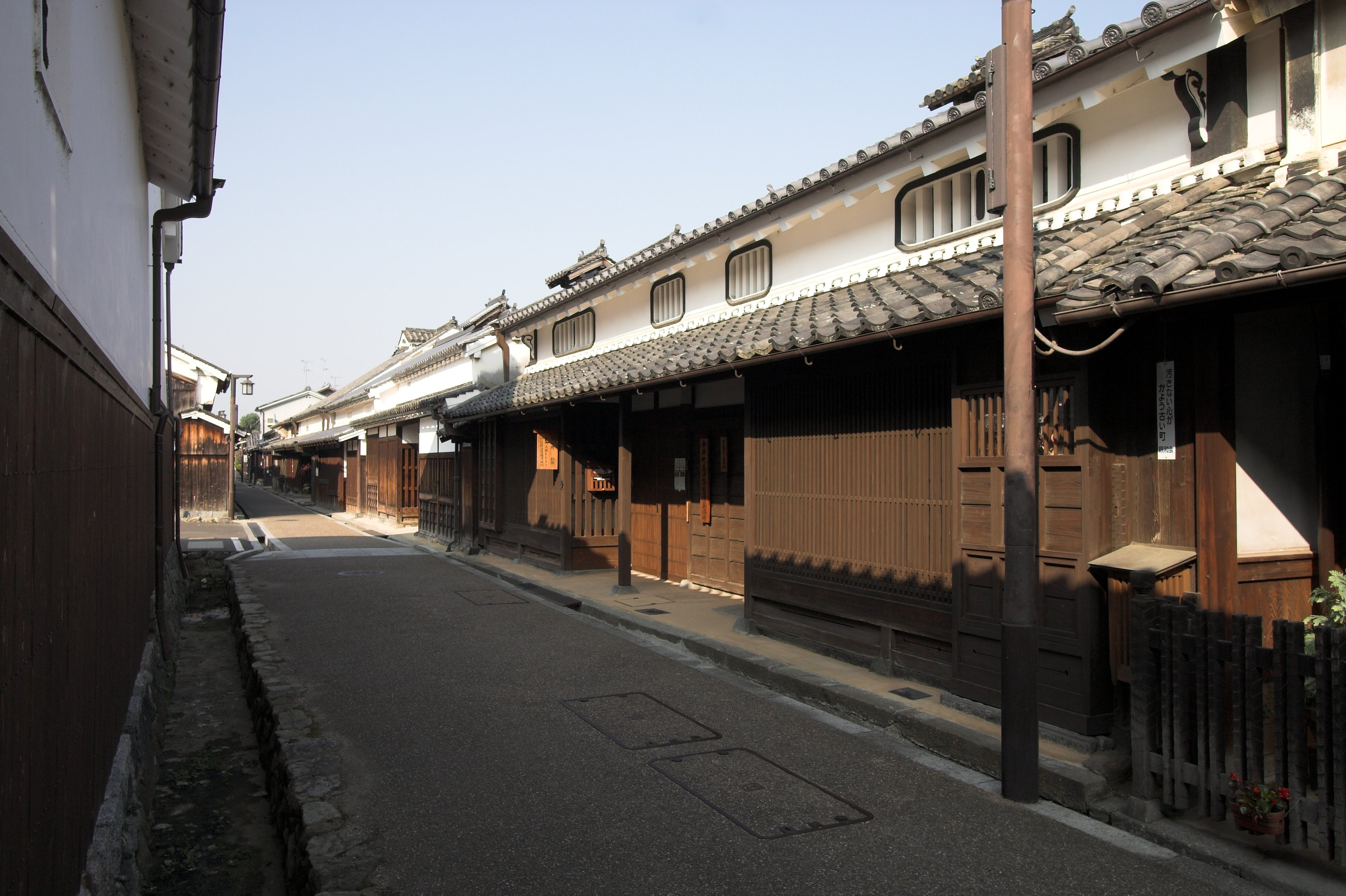 重要伝統的建造物群保存地区・今井町(奈良県橿原市, Japan)